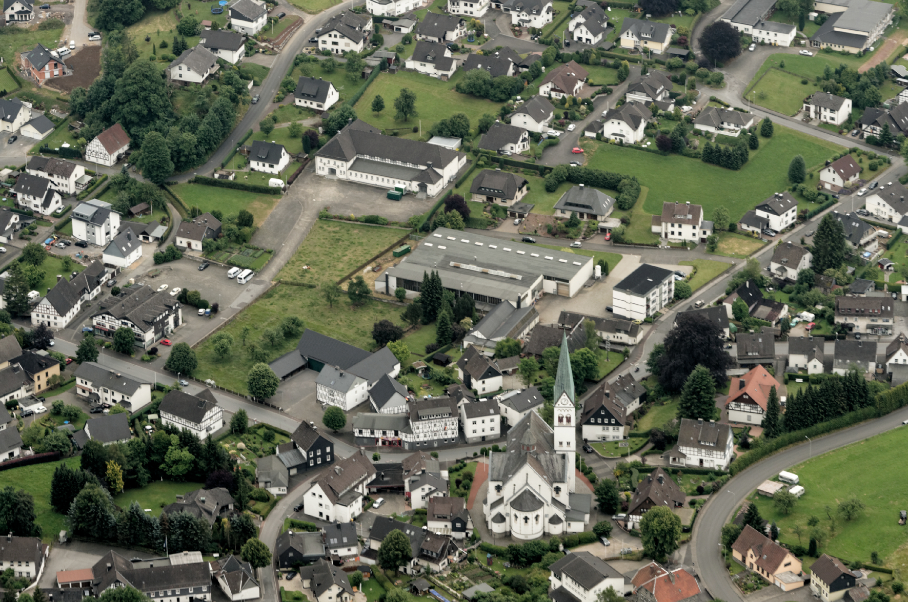 Fotoflug Sauerland Nord. Teilansicht Heggen mit Kirche und Schützenhalle. The making of this document was supported by the Community-Budget of Wikimedia Germany.